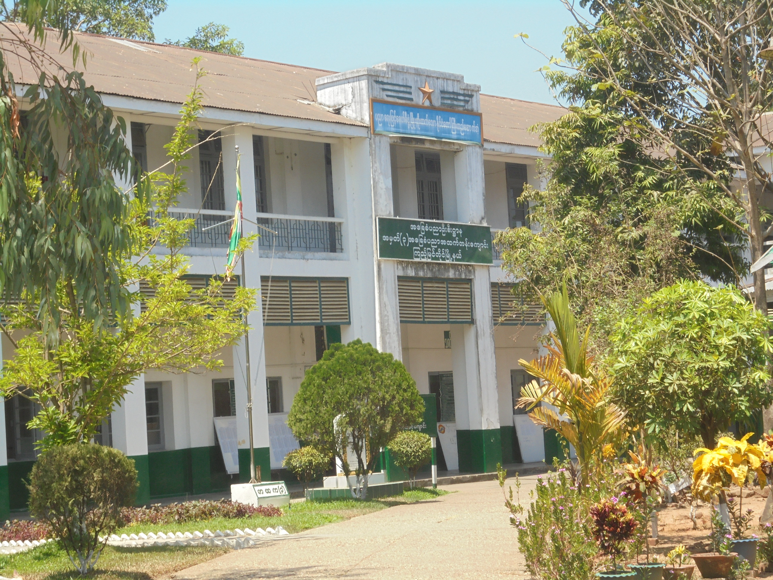 မြန်မာဘာသာ: အ.ထ.က(၃)ကြည့်မြင်တိုင်